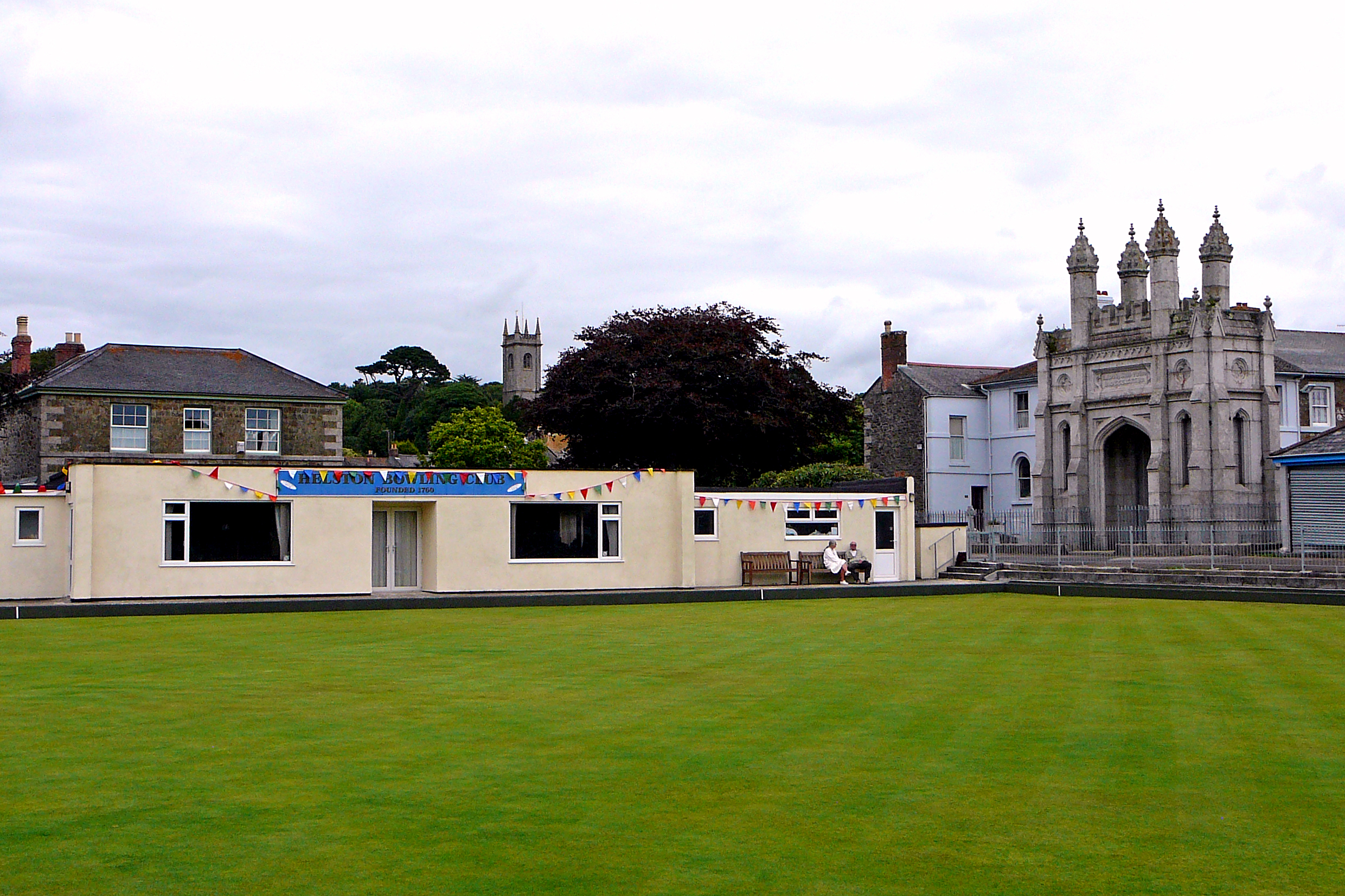 Bowling Green, Helston